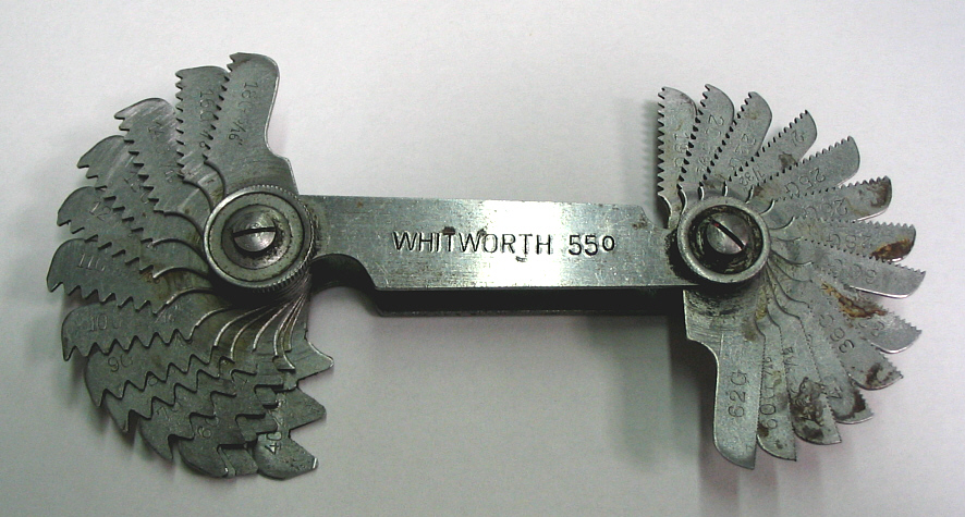 Thread gauge / Gewindeschablone für Zollgewinde